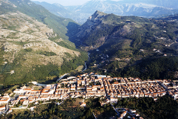 foto panoramica verso il Matese